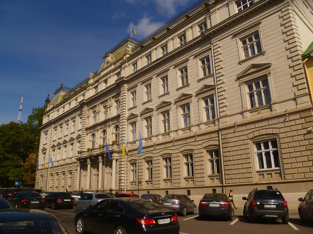 Будинок Галицького намісництва, сьогодні - будинок Львівської обласної Ради